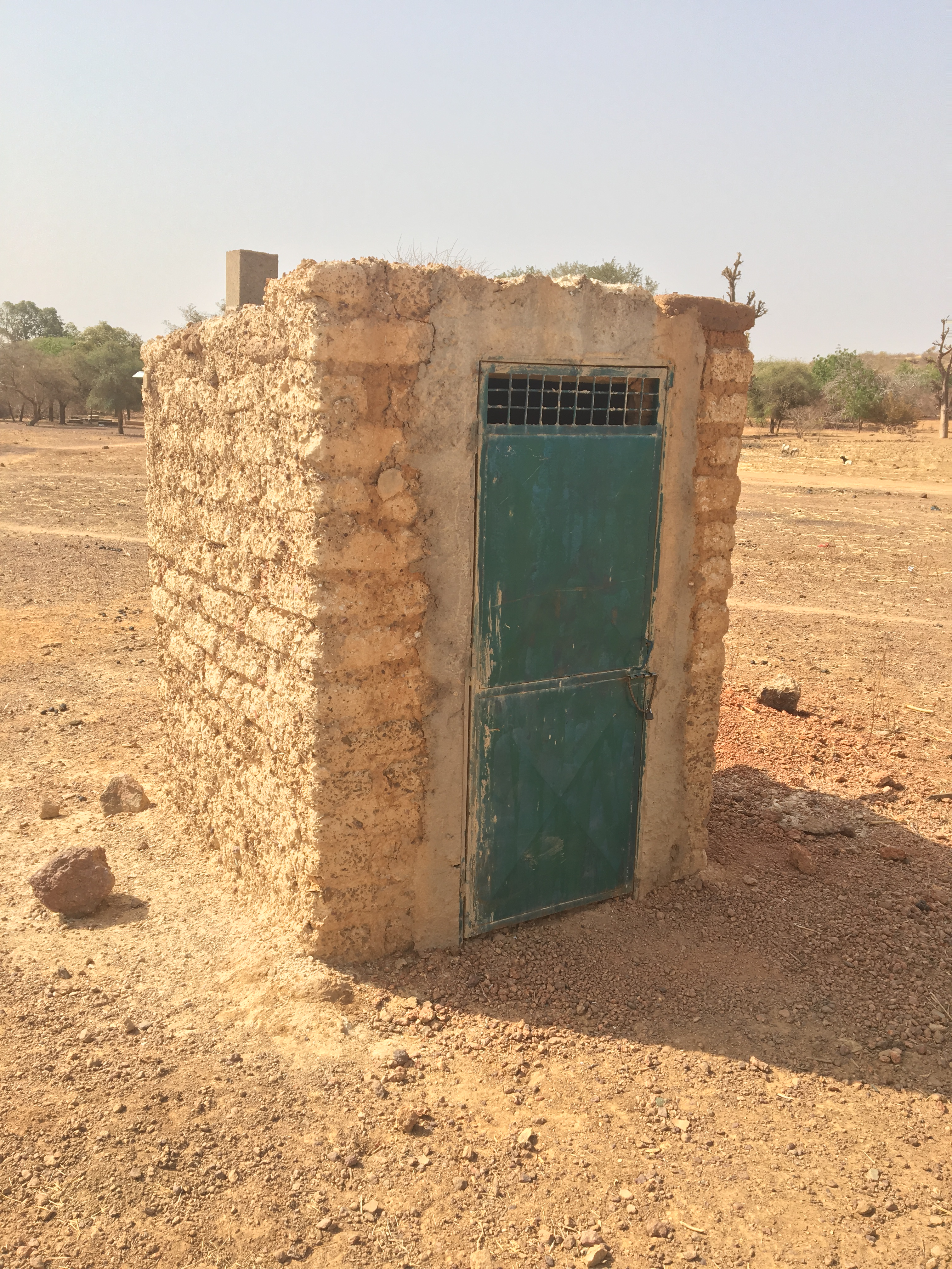 Exemple d'une latrine de Ouazellé, construit en 2016